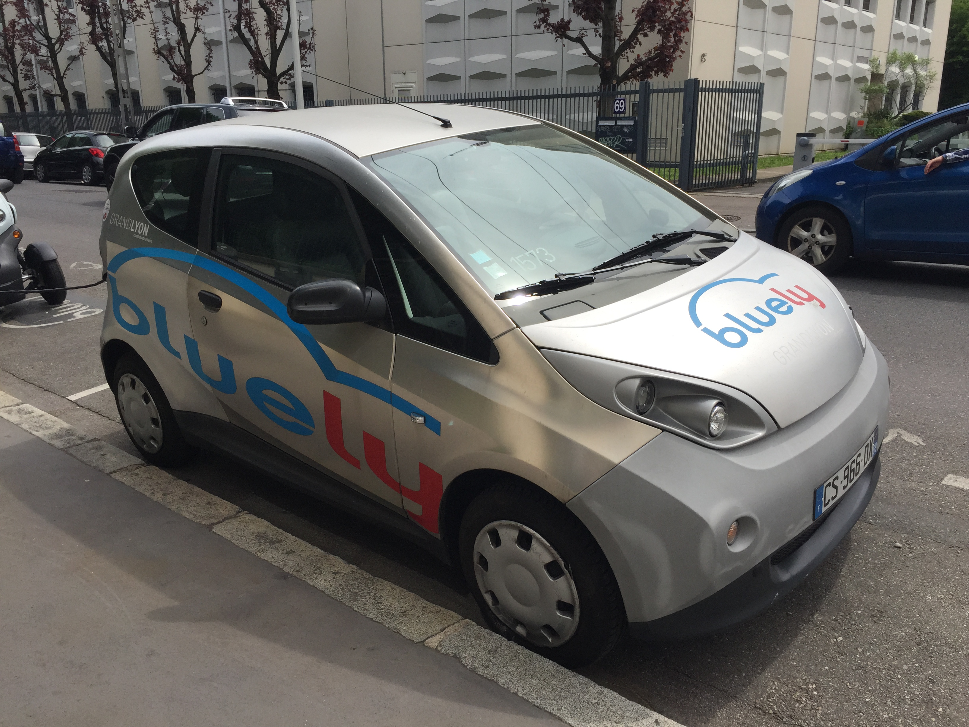 Bluely, rue Hénon.